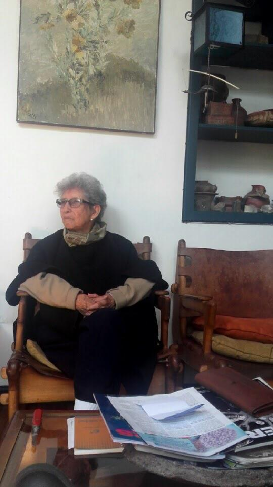 Durante las últimas décadas, Eudoxia Estrella pasa los días en su casa patrimonial junto a su obra